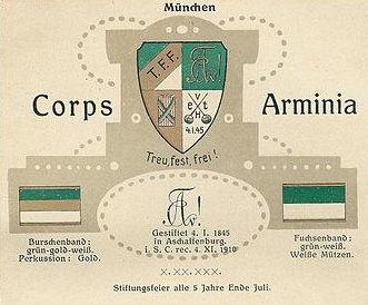 Wappen, Zirkel, Couleur und Corpshaus der Arminia München